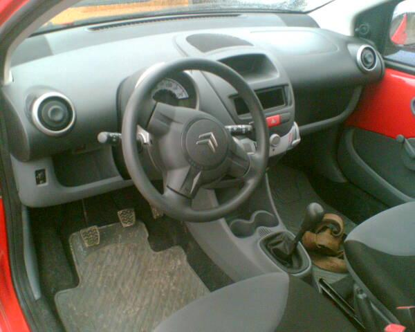 Citroen C1 indoor